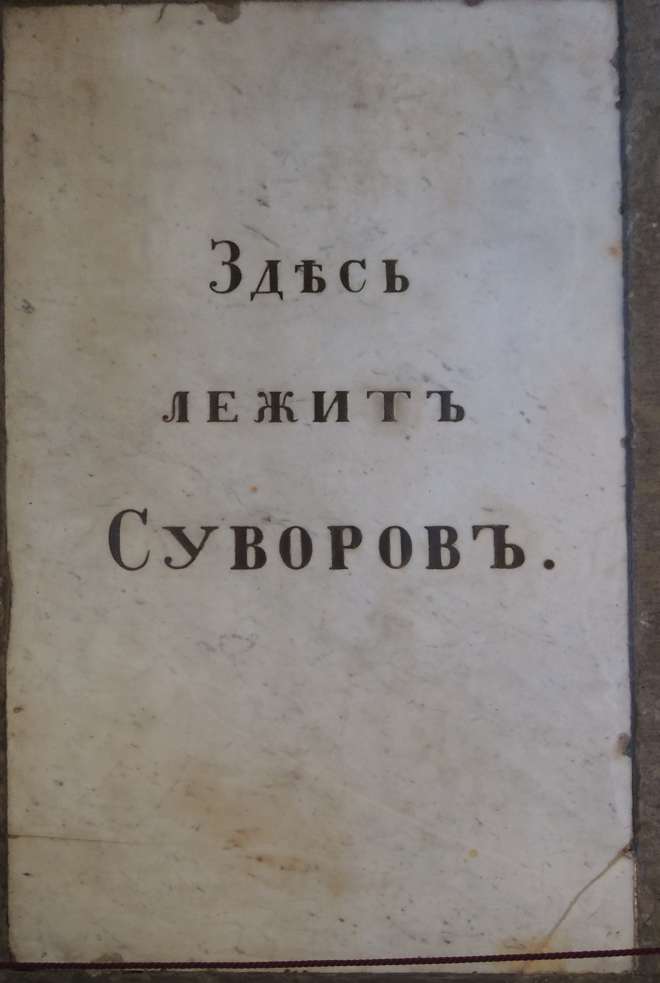 Суворов Александр Васильевич 13.11.1729-06.05.1800 Россия. Санкт-Петербург. Благовещенская усыпальница. Напольная плита. Неизвестный мастер 1859 г. Бюст. Современная отливка по модели В. И. Демут-Малиновского. Медальон с эпитафией: "Здесь лежит / Суворов / Генералиссимус / Князь Италийский / Гр. Александр Васильевич / Суворов Рымникский / родился 1729 г. ноября 13-го дня / скончался 1800 года мая 6-го / Тезоименитство его ноябр. 24" Неизвестный мастер 1800-е.